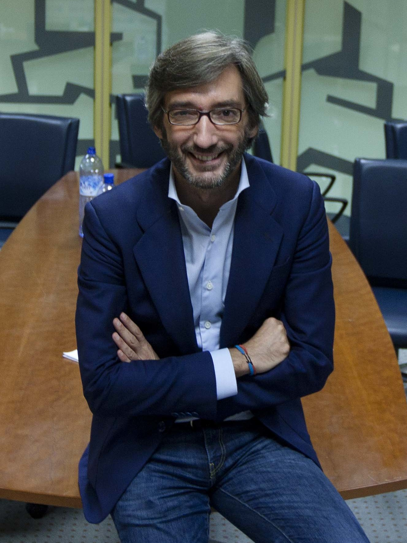 Iñaki Oyarzabal, número dos del PP vasco, en Vitoria.